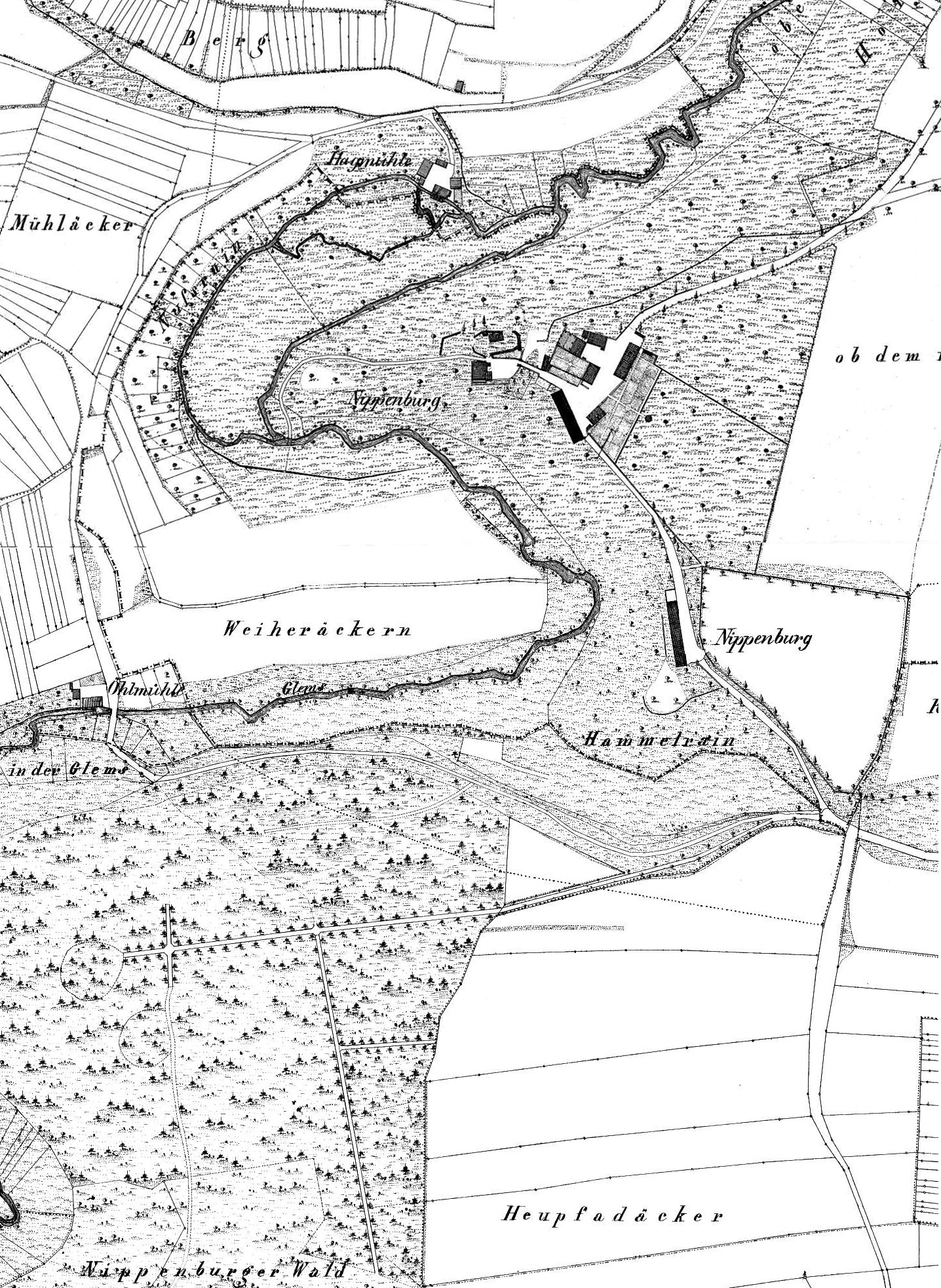 Burgruine und Schloss Nippenburg mit Hagmühle und Ölmühle auf den Urflurkarten NO 3301 und NO 3401 von 1831 (Composit von Ausschnitten) im Maßstab 1:2500